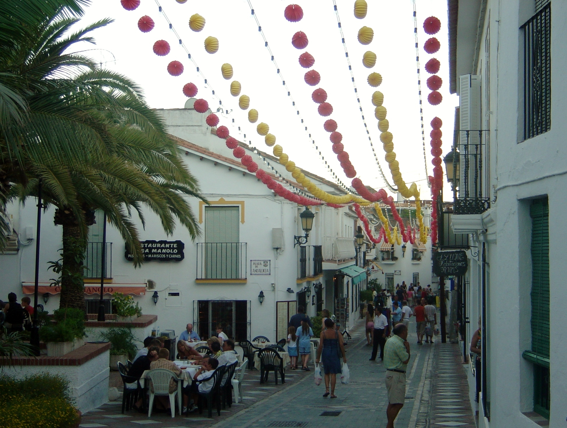 Calle típica de Benalmádena Pueblo (Málaga, España). Foto por comakut.